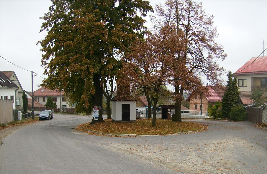 Sviny na Moravě (u Velkého Meziříčí)